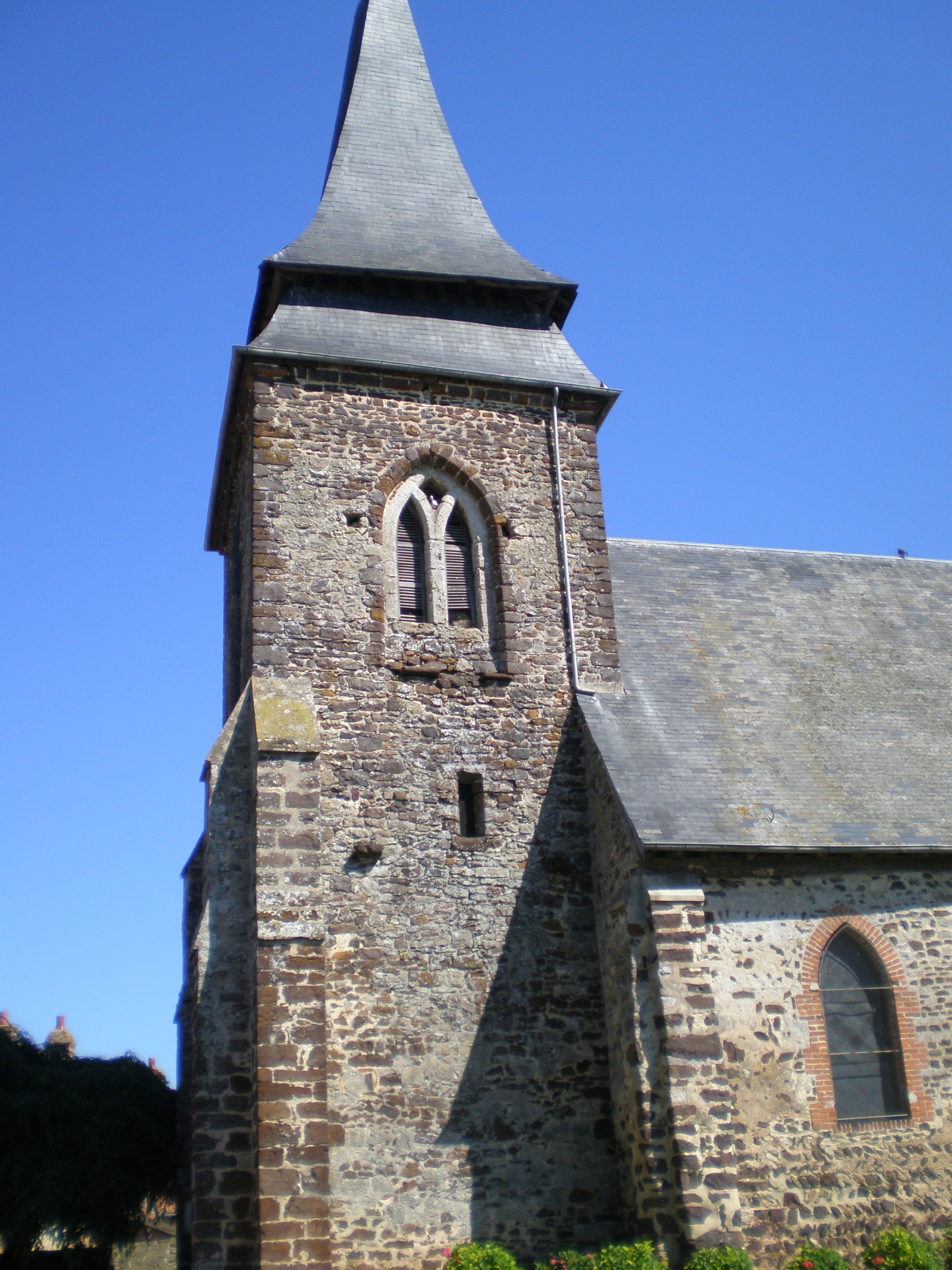 église Saint-Saire dans le village brayon du même nom.